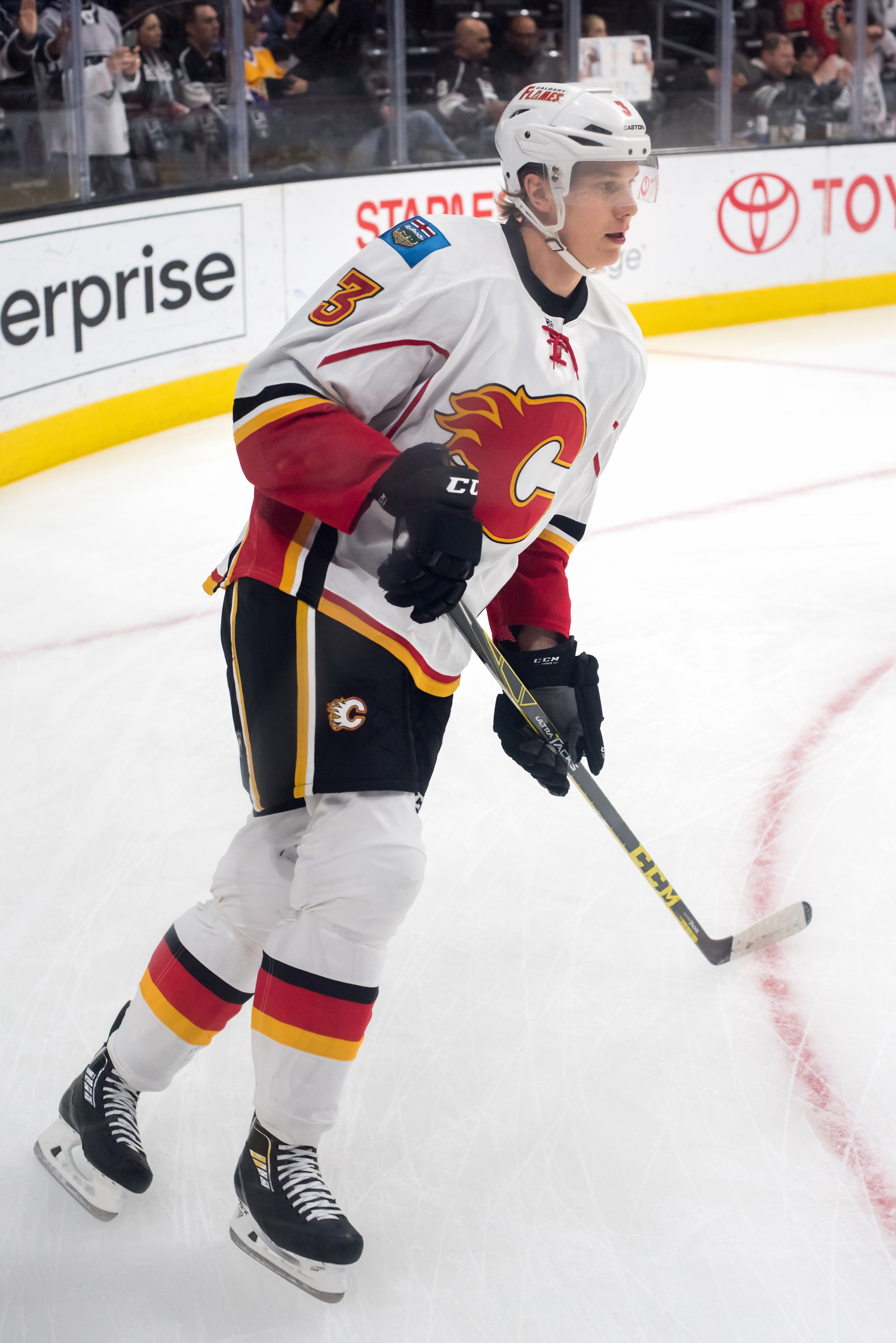 Jyrki Jokipakka